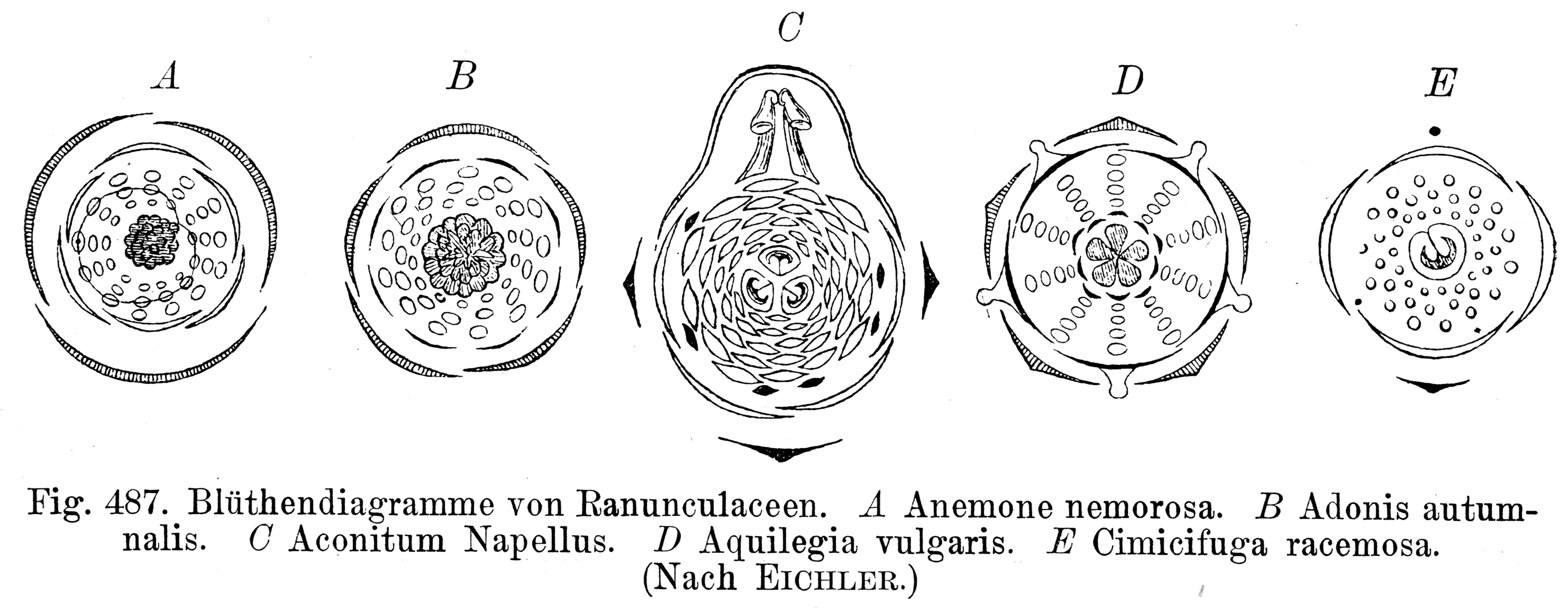 Flower diagram of several Ranunculaceae: A Anemone nemorosa, B Adonis autumnalis, C Aconitum napellus, D Aquilegia vulgaris, E Cimicifuga racemosa